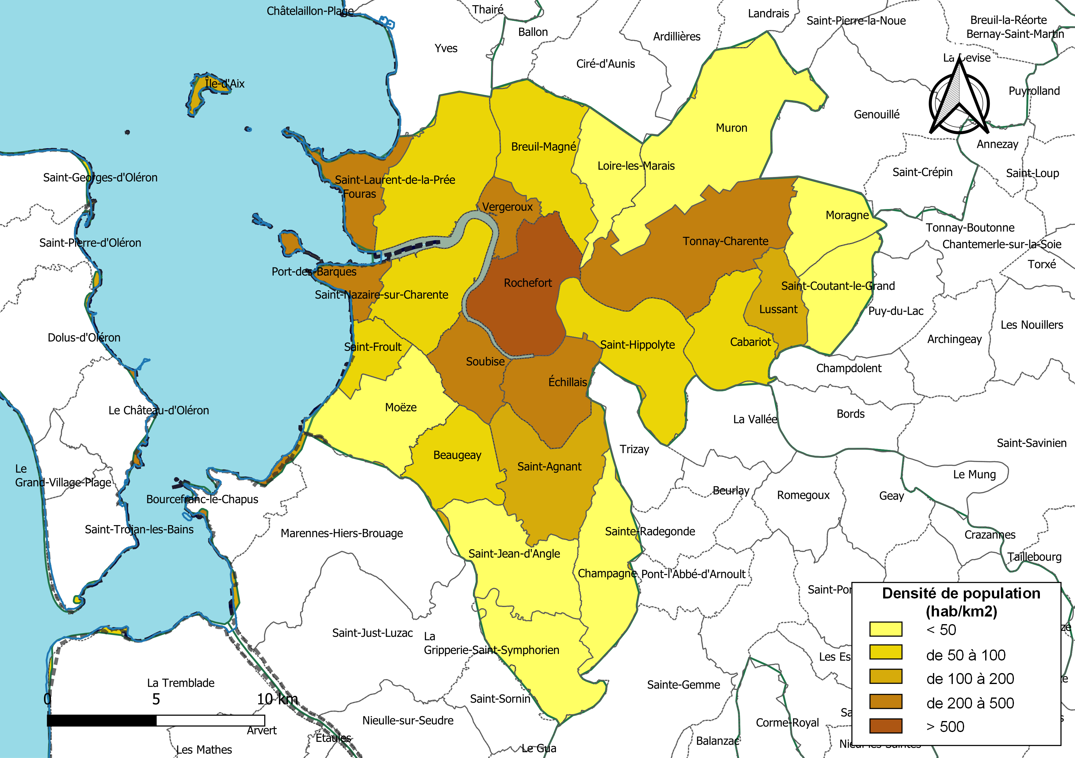 Carte des densités de population (millésimée 2016) des communes de la communauté de communes la Communauté d'agglomération Rochefort Océan, département de la Charente-Maritime, France. Composition au 1er janvier 2019.